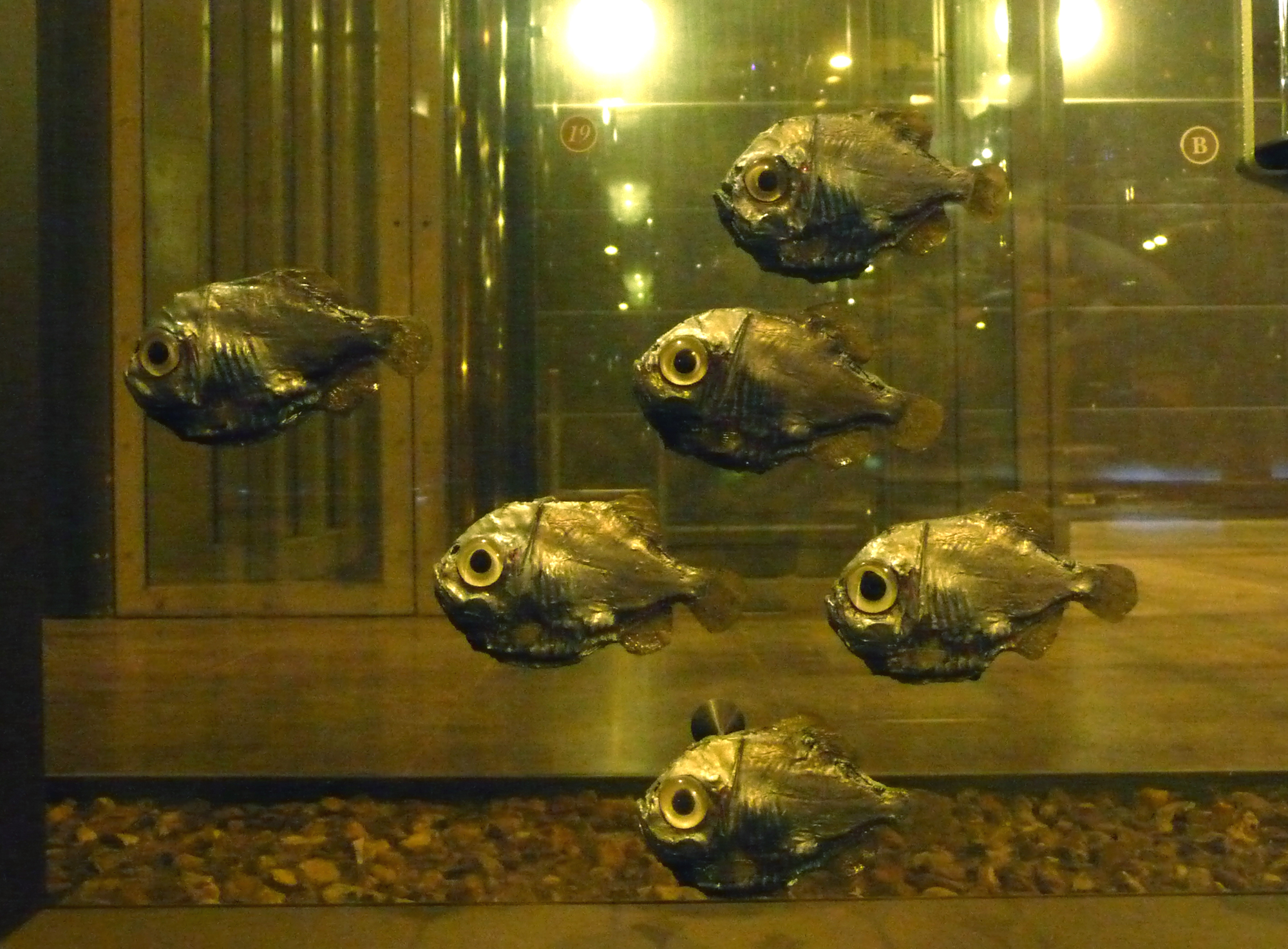 Hache d'argent naturalisé Argyropelecus hemigymnus